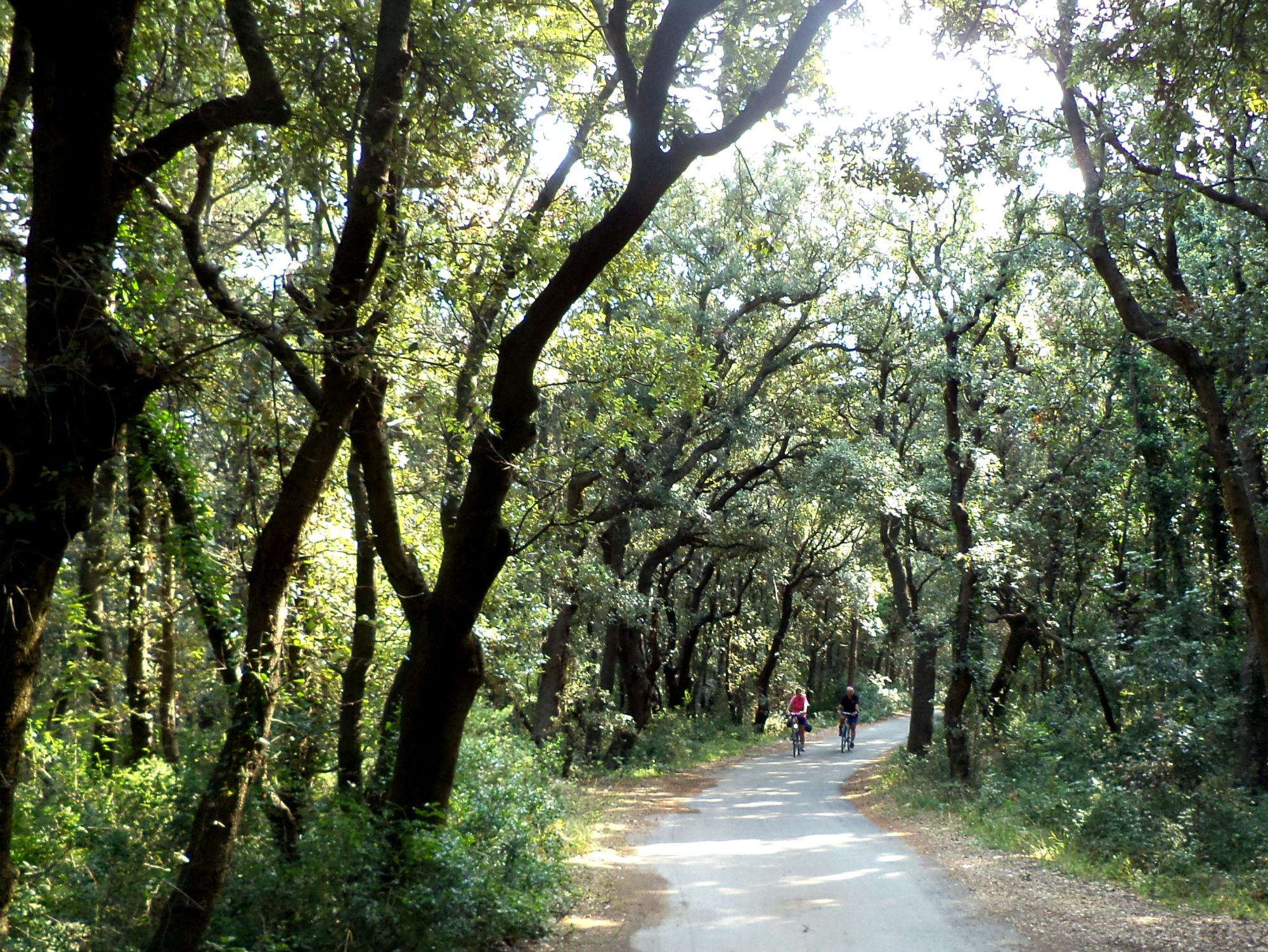 Woods Dundo - Kampor, Hrvatska